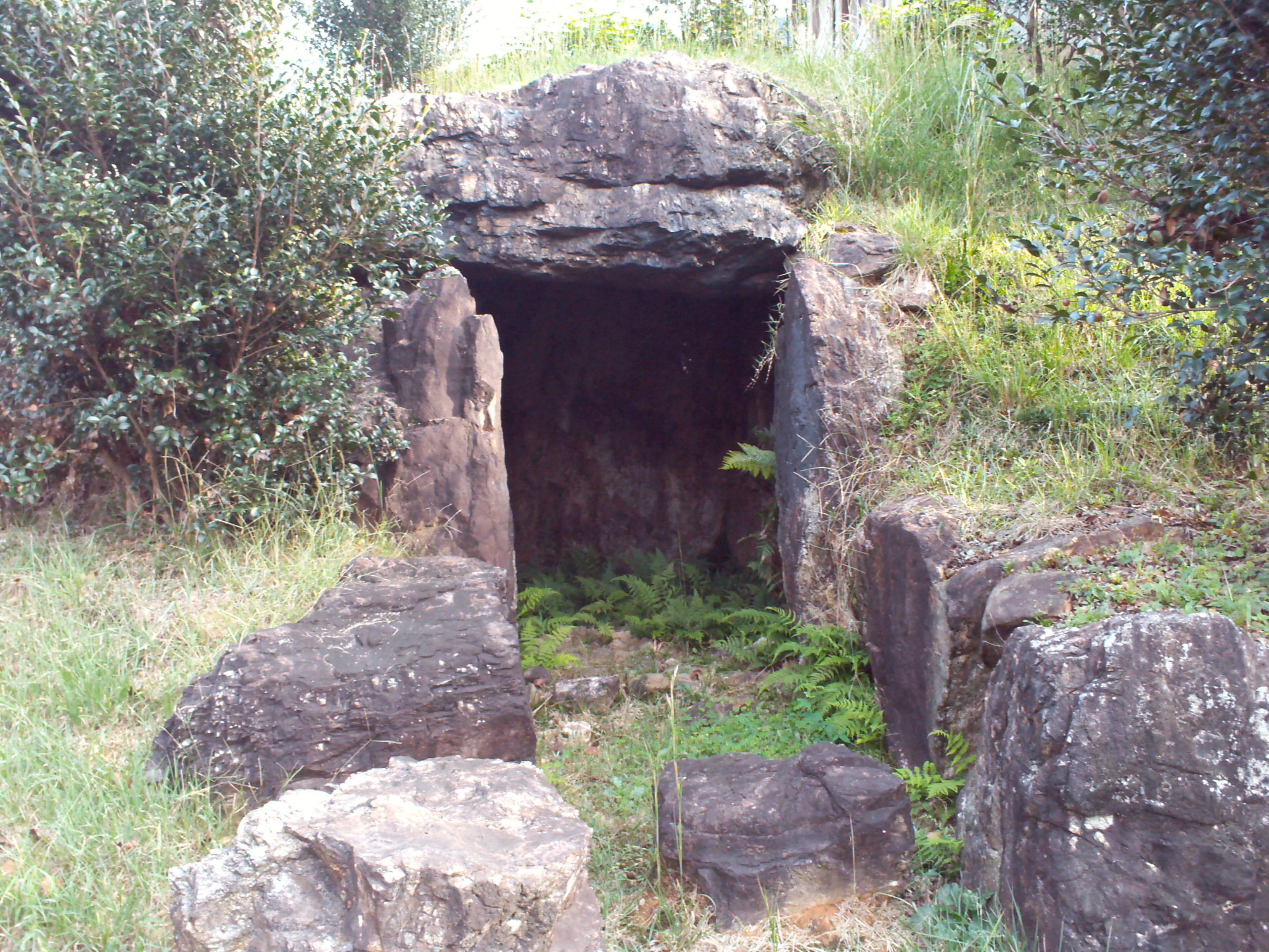 tengudani iseki（天狗谷遺跡）